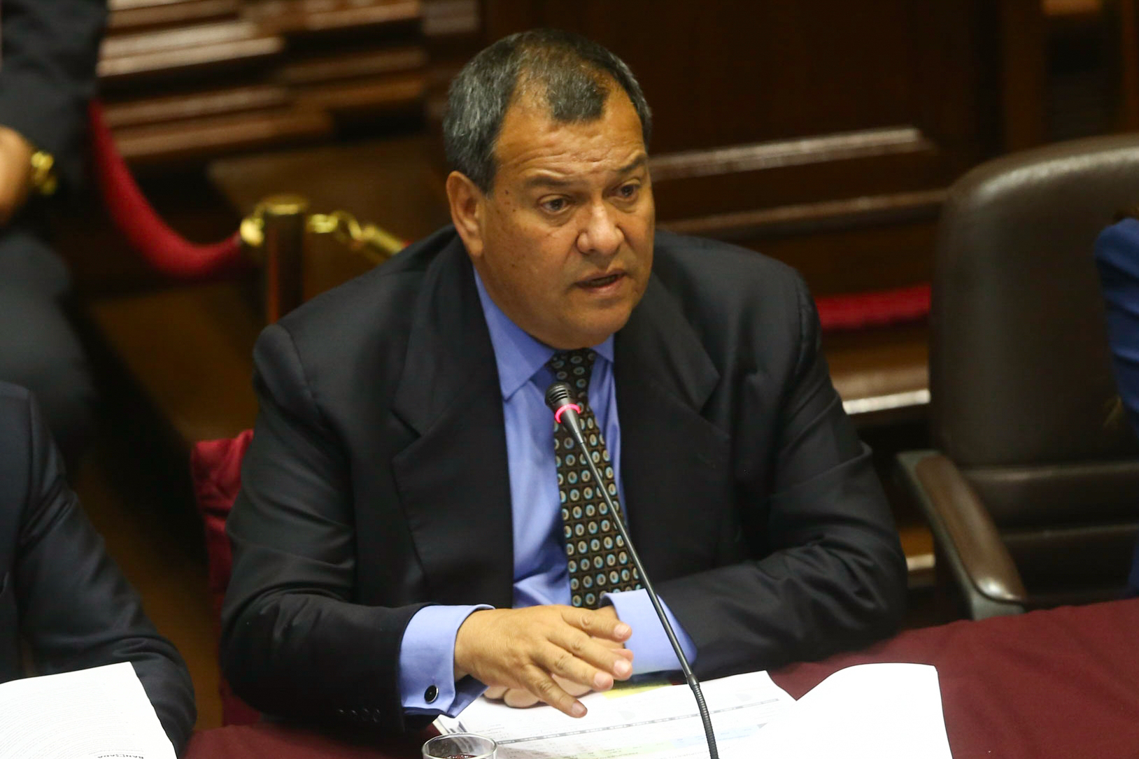 Ministro de Defensa Jorge Luis Nieto acudió a comisión de presupuesto del Congreso presidida por Karina Beteta.